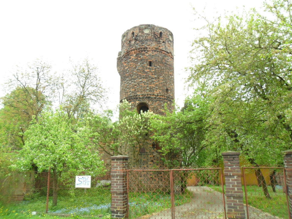 Gubin - Baszta Dziewicza w zespole murów miejskich